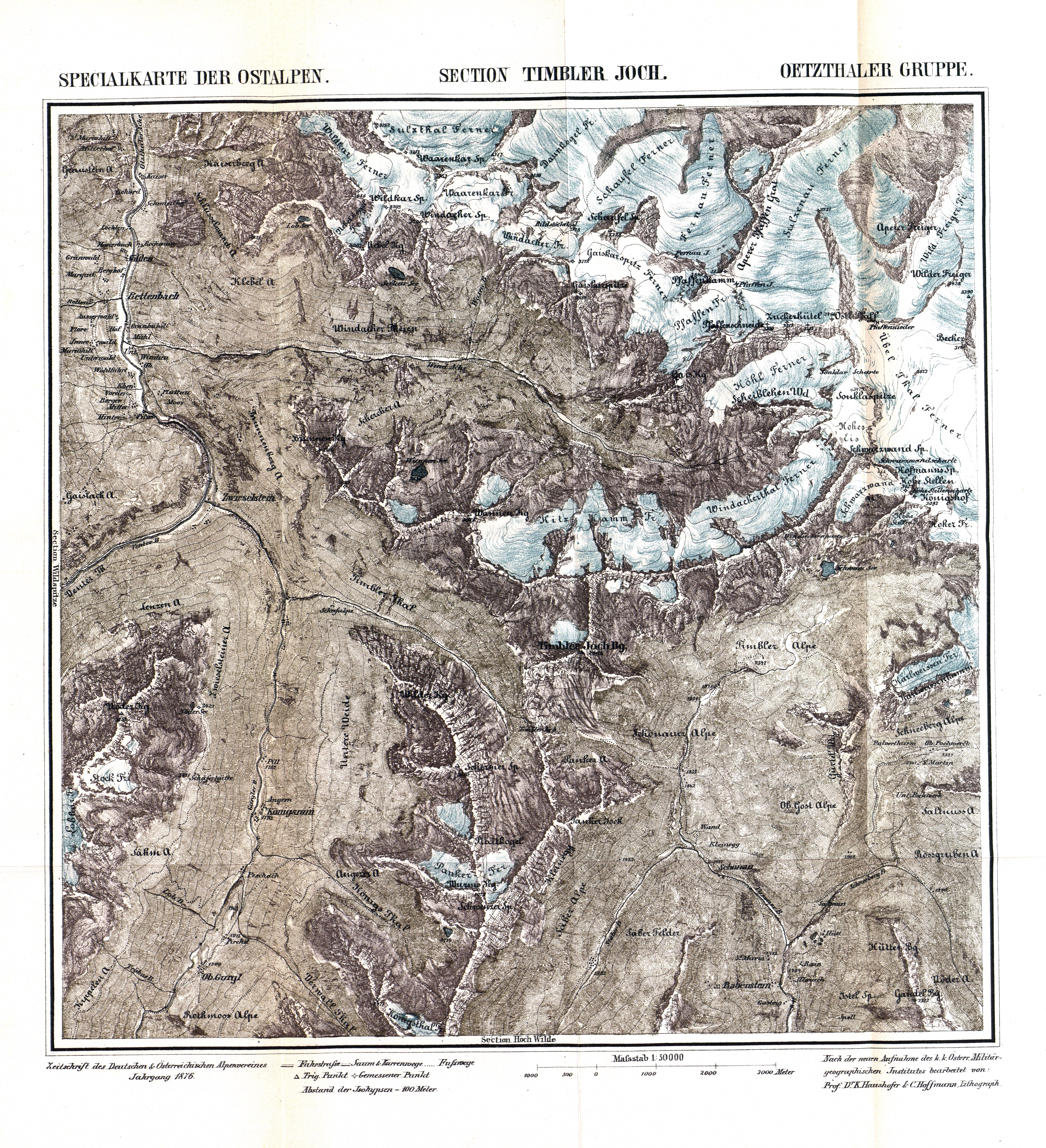 Specialkarte der Ostalpen Section Timbler Joch aus Zeitschrift des Deutschen und Oesterreichischen Alpenvereins 1876 Band 7